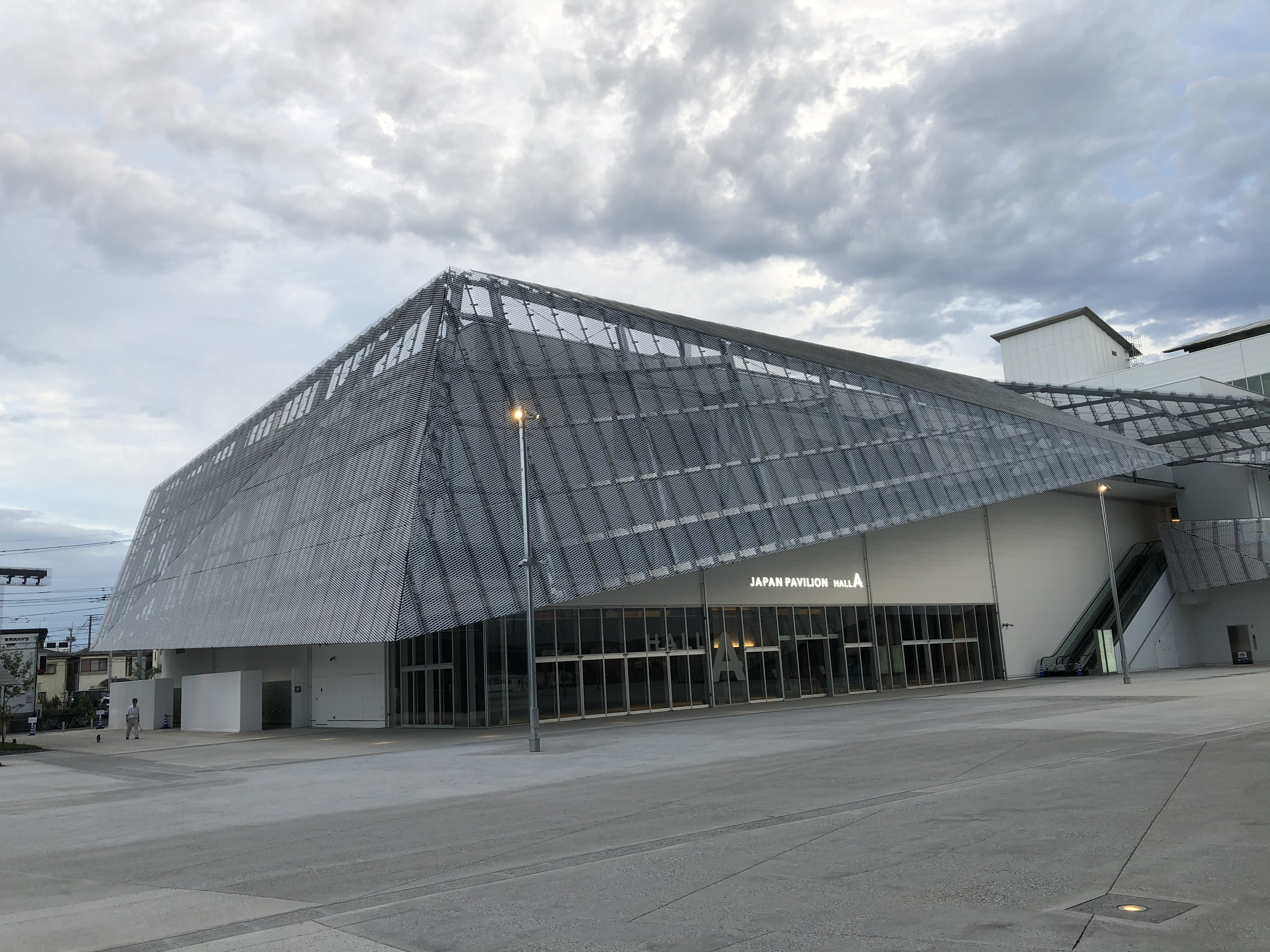 ジャパンパビリオンは、KADOKAWAのイベントホールである。